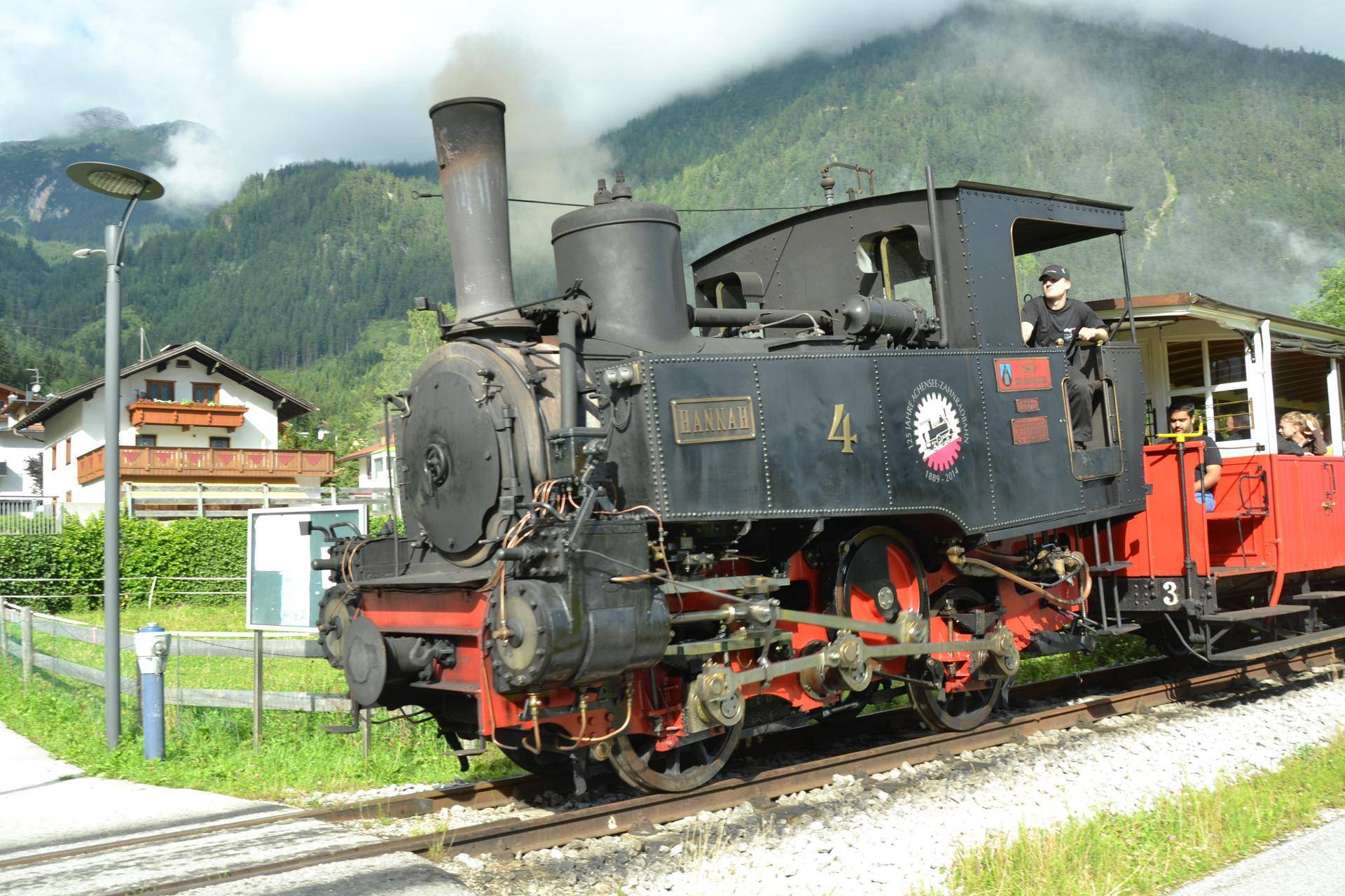 Lok Nr. 4 der Achenseebahn bei der Haltestelle Maurach Ort auf dem Weg zum Seespitz